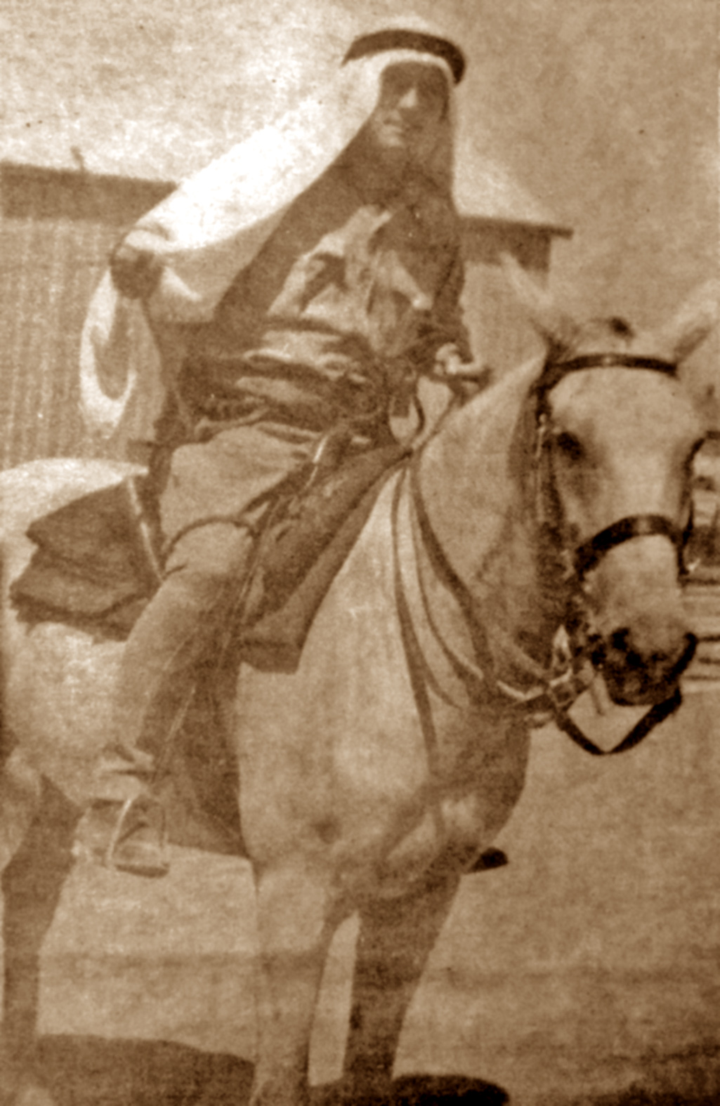 Lewis Yelland Andrews לואיס אנדרוס